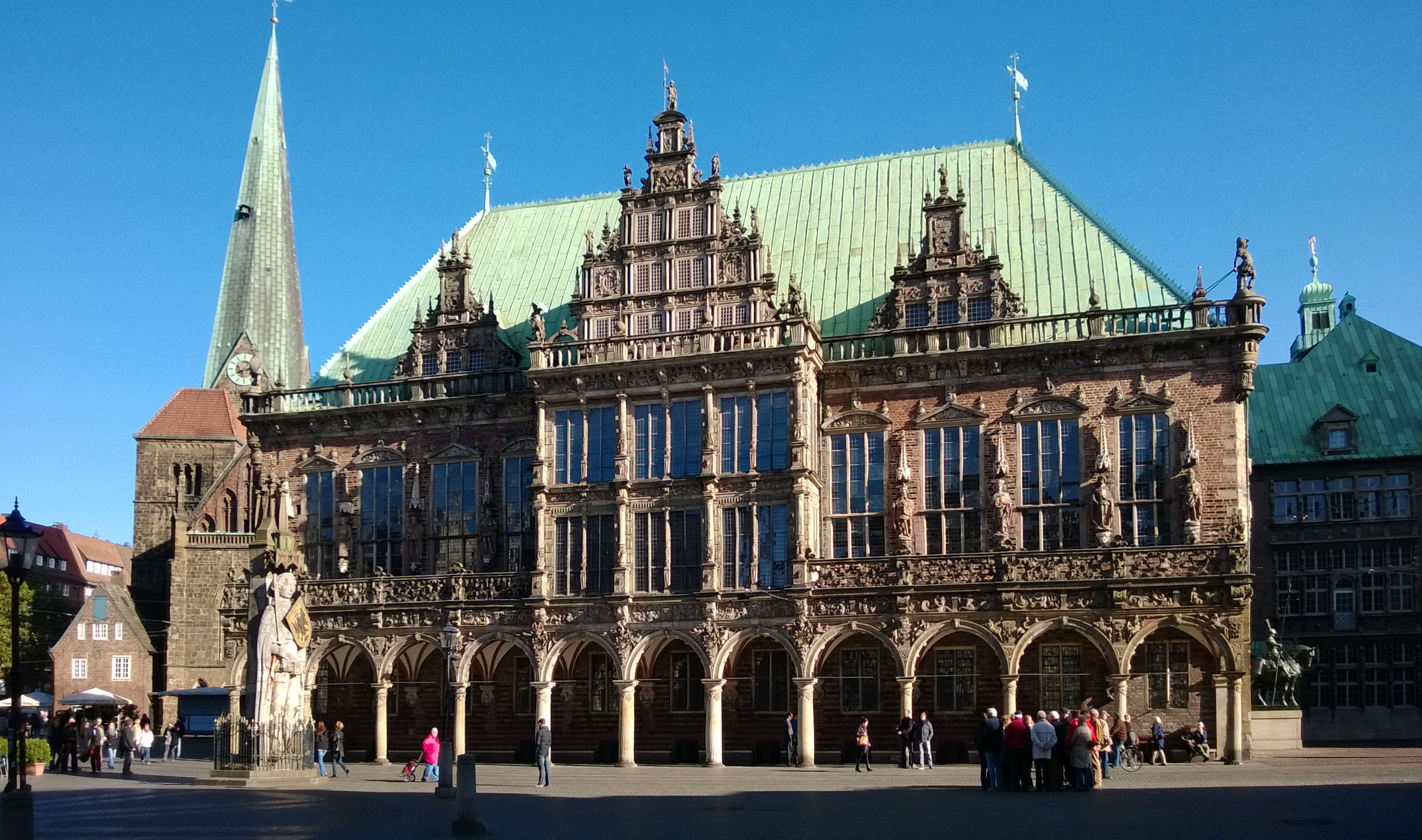 Rathaus in Bremen,Das abgebildete Objekt ist ein geschütztes Kulturdenkmal in der Freien Hansestadt Bremen, mit der Nr. 0066,T001 beim Landesamt für Denkmalpflege registriert.